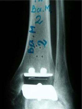 Röntgenbild einer implantierten Sprunggelenk-Endoprothese mit einer Tibia-Gleitplatte (oben) und einer Kappe für den Talus (unten), dazwischen ein Gleitkern aus Polyethylen.